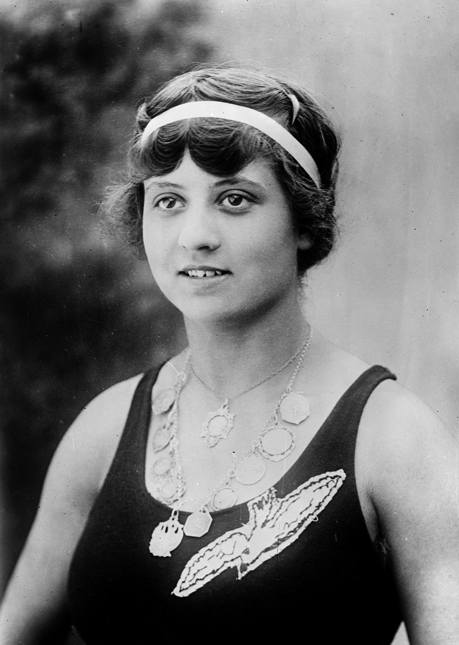 [Portrait d'] Yvonne Degraine [nageuse, avec le maillot du club des Mouettes] : [photographie de presse] / [Agence Rol]